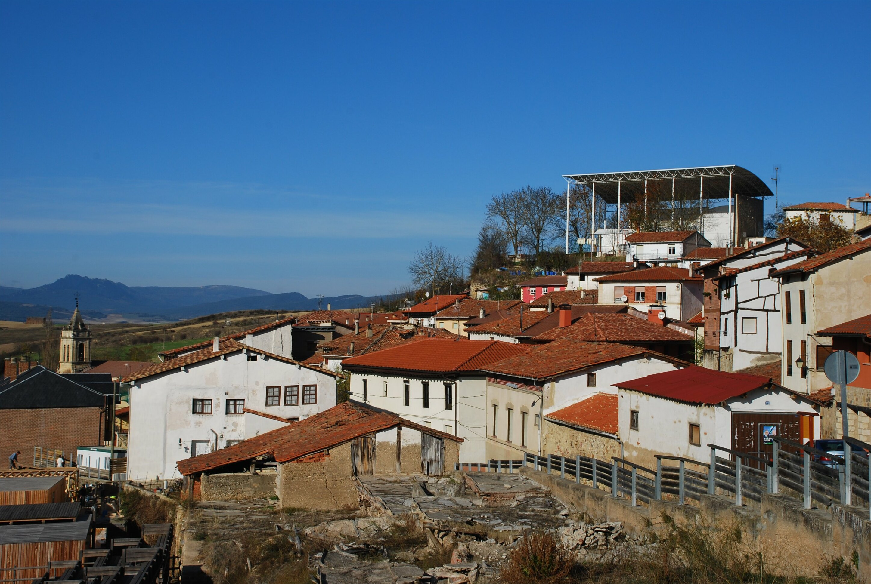 Añana, municipio de Álava (País Vasco - España)